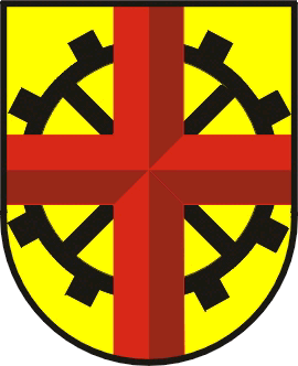 Wappen Primstal (Nonnweiler)